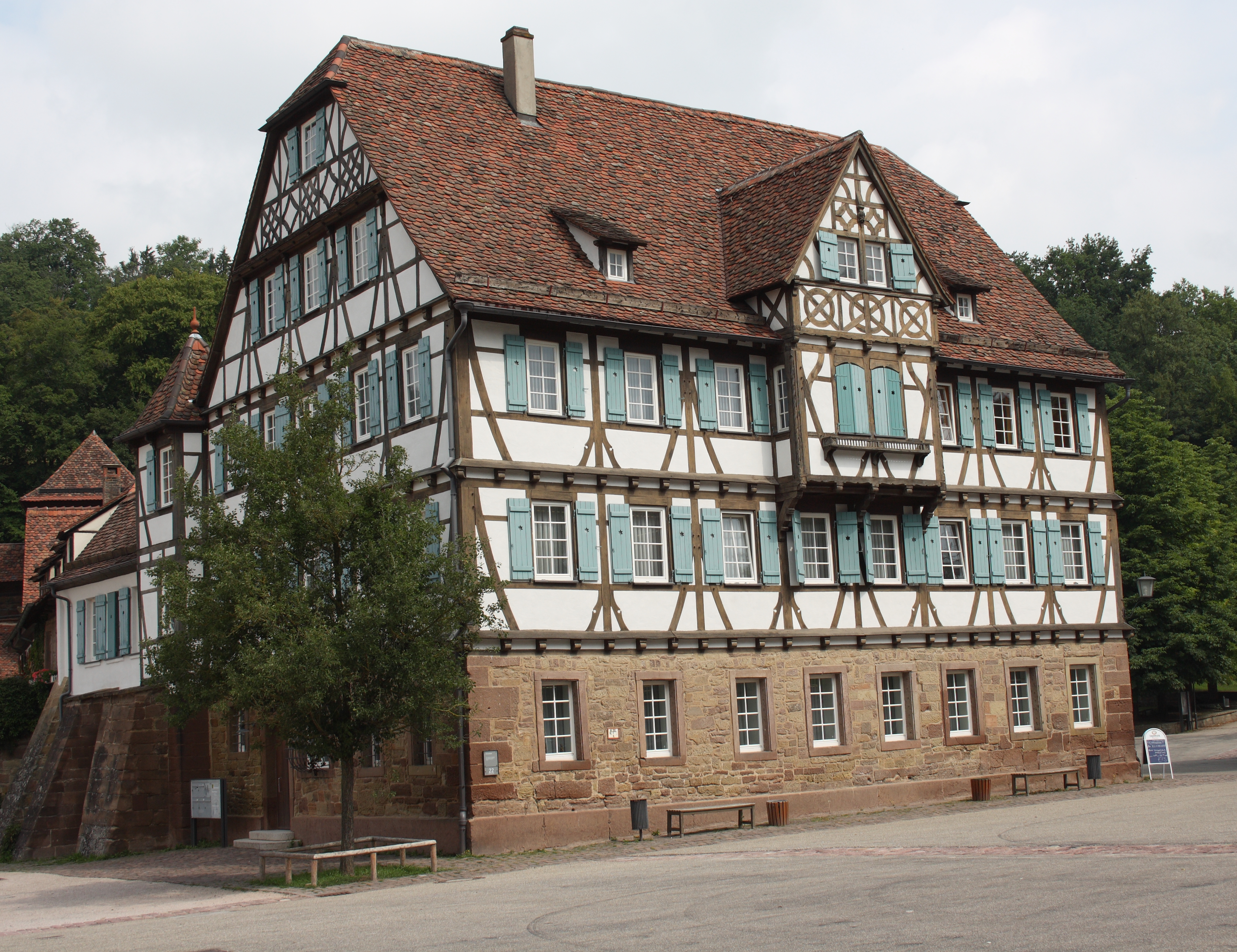 Kloster Maulbronn